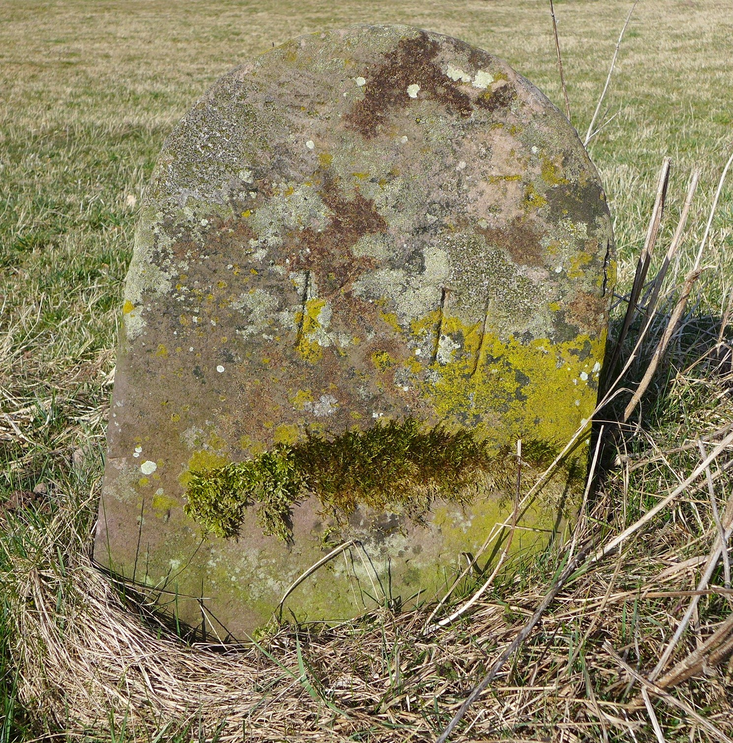 An der K48 - KH Königreich Hannover